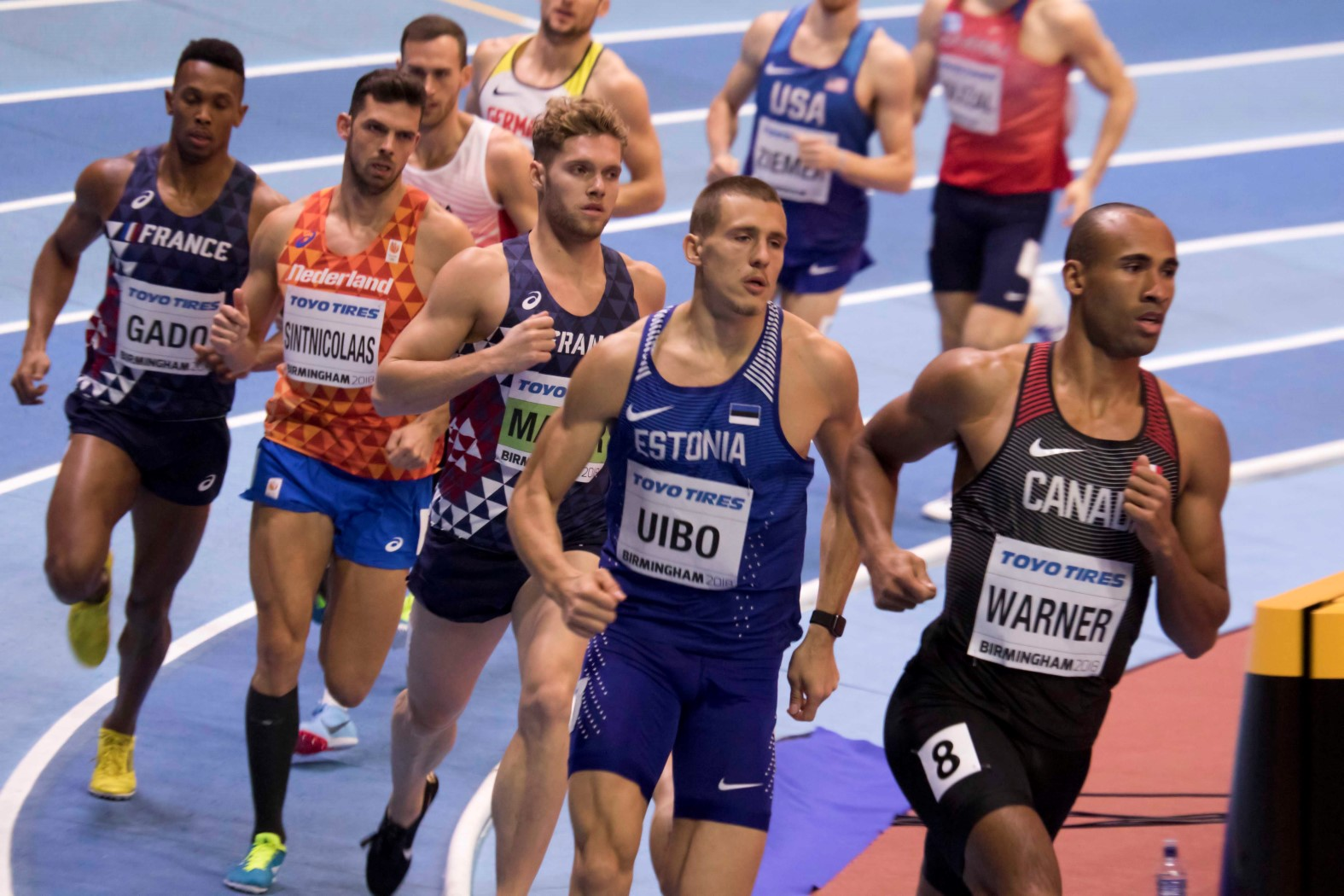 WK3B0171 1000m zevenkamp